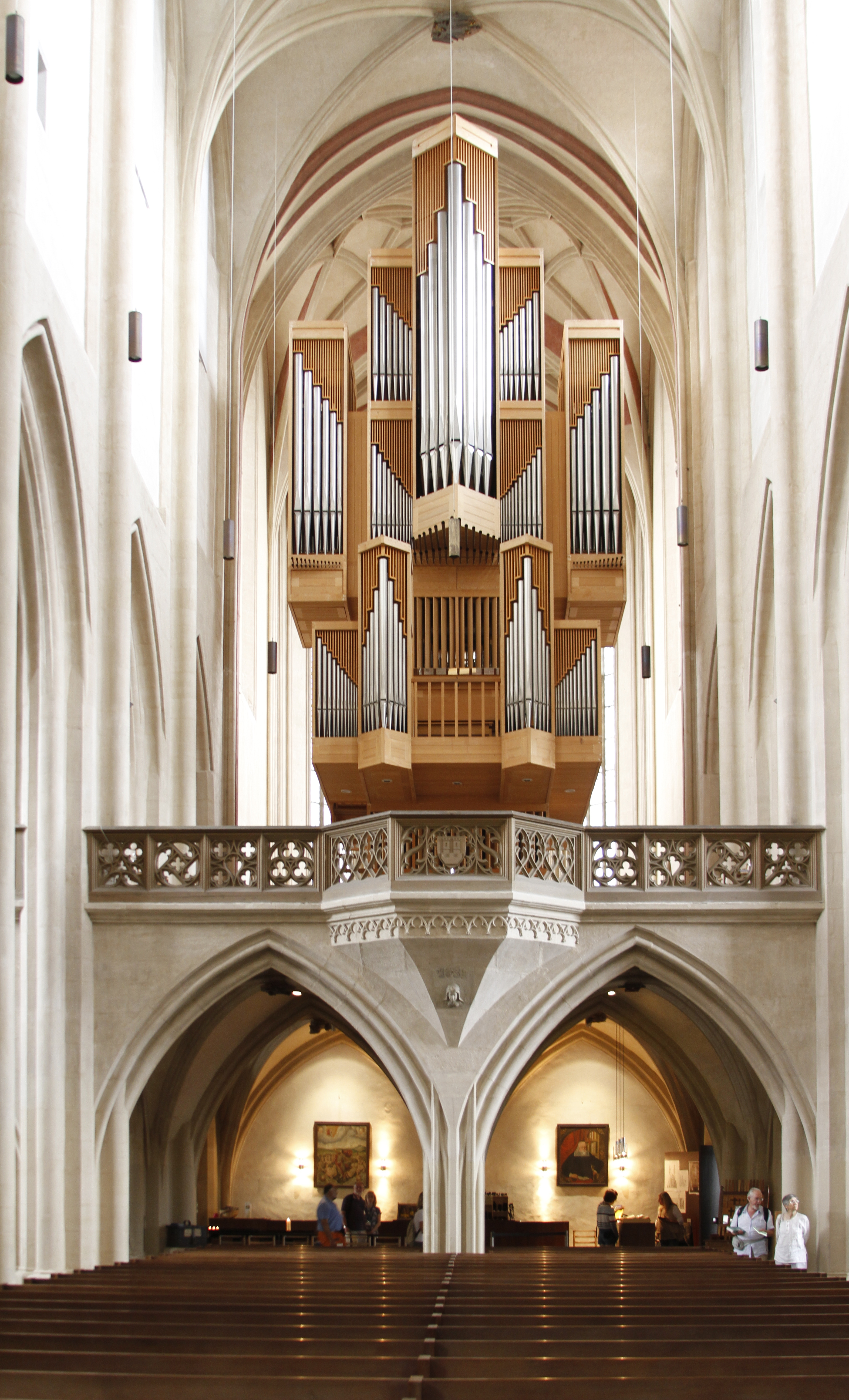 Interior of St. Jakob in Rothenburg ob der Tauber - Germany